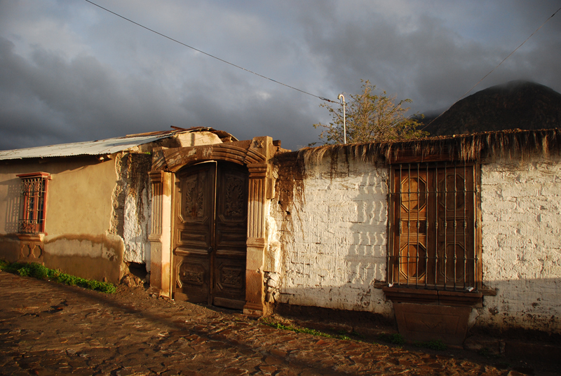 Chile. Provincia de Parinacota. Vista de uno de los portales de piedra tallada que quedan en el pueblo de Putre.